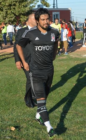 Toraman 8 Eylül ( 8.09.2013 ) 'te oynanan dostluk maçında ilimiz takımlarından fotoğrafçılığını yaptığım Tekirdağspor maçında ikinci yarı başlamadan az önce.